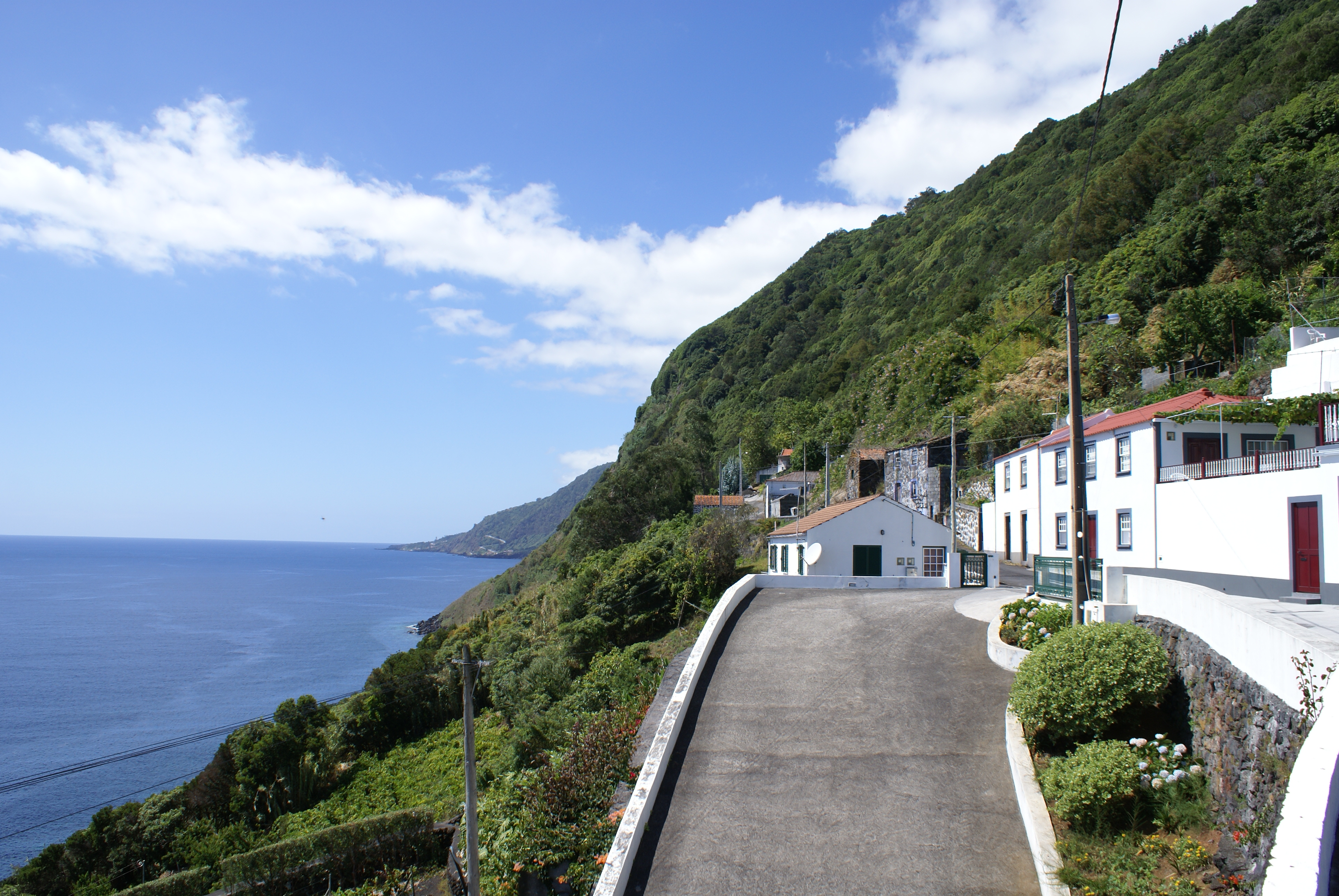 Fajã Grande, aspectos, Calheta, ilha de São Jorge, Açores